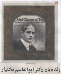 ابوالقاسم بختیار